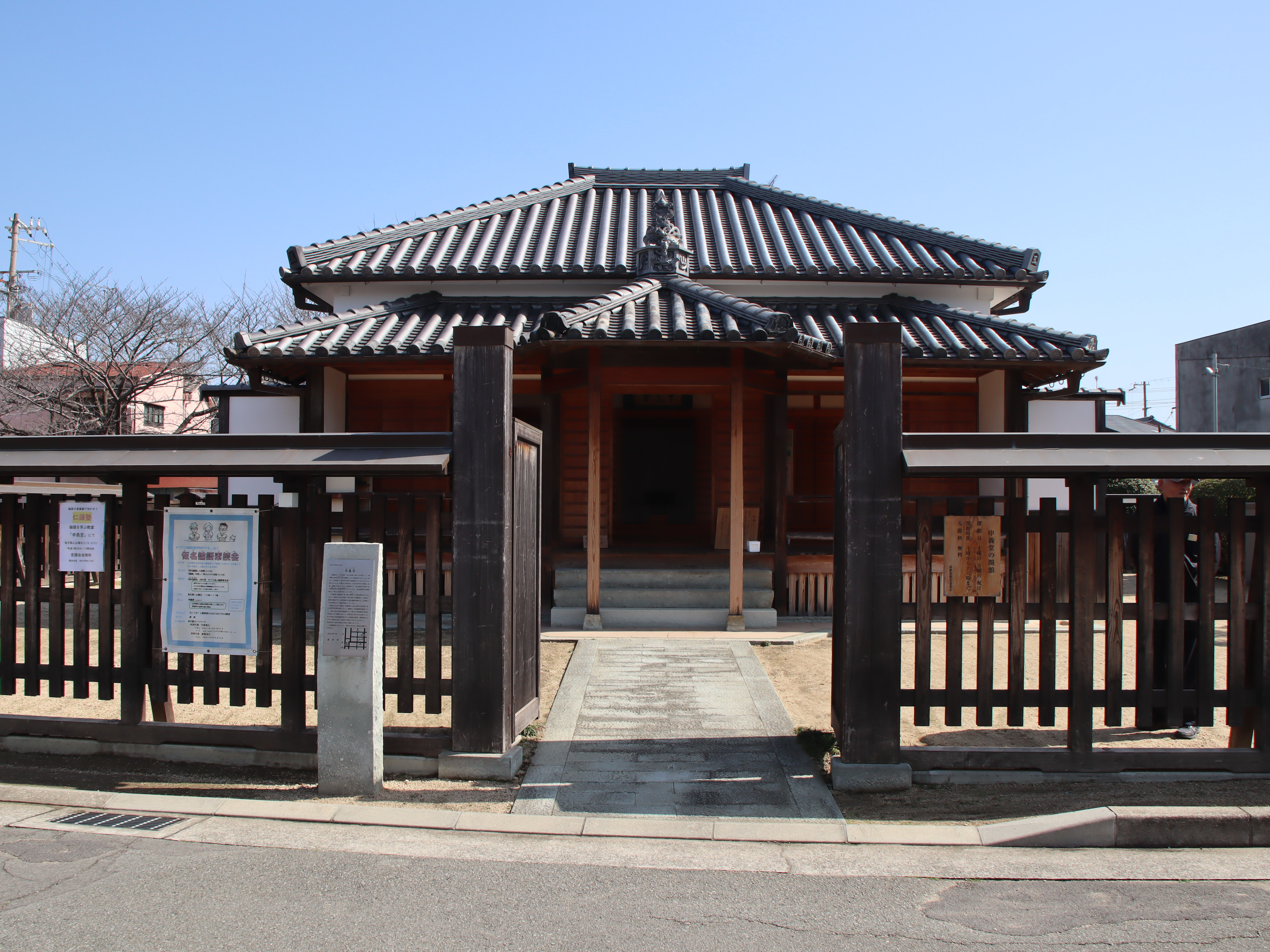 申義堂正門